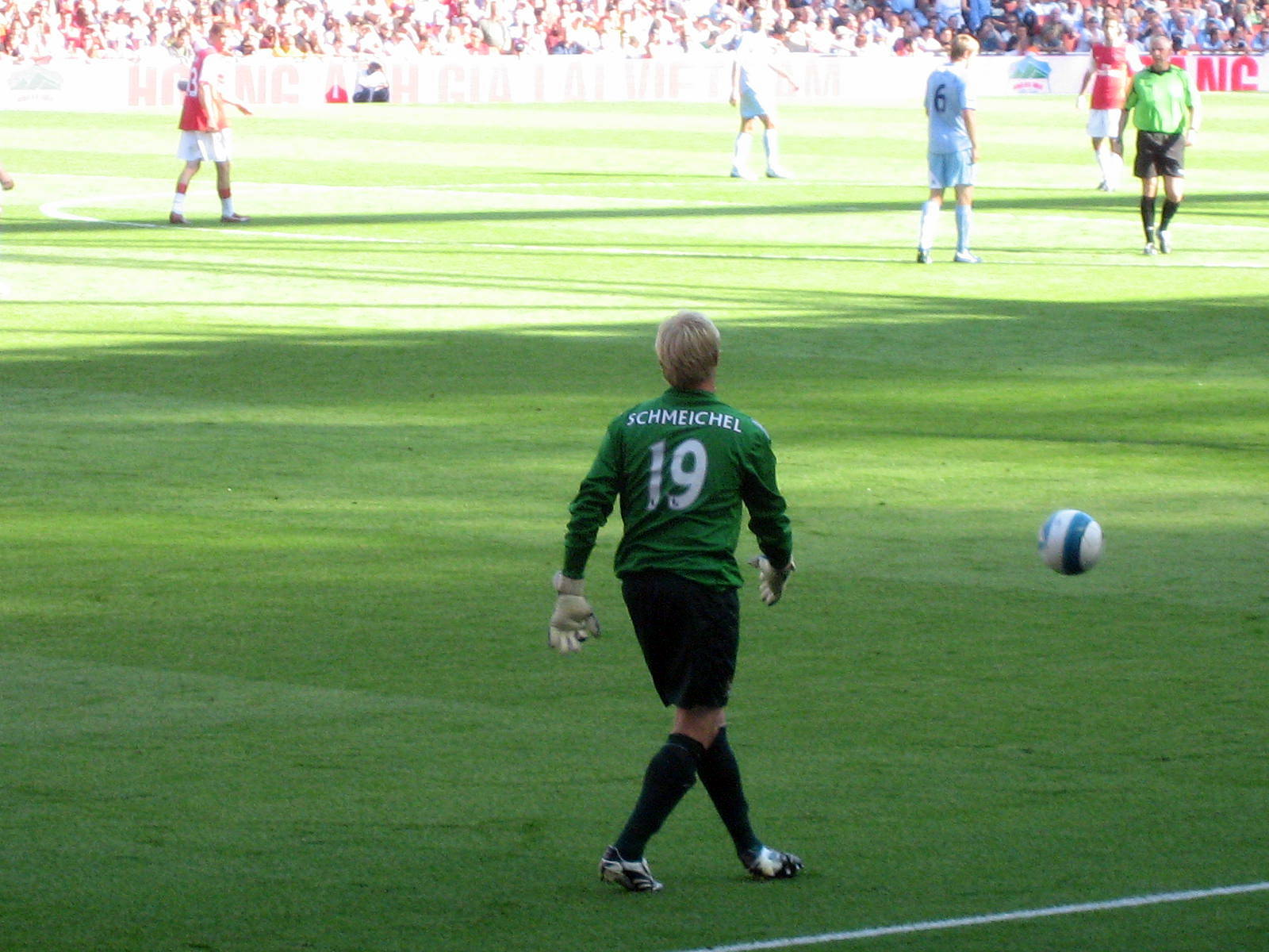 Kasper Schmeichel